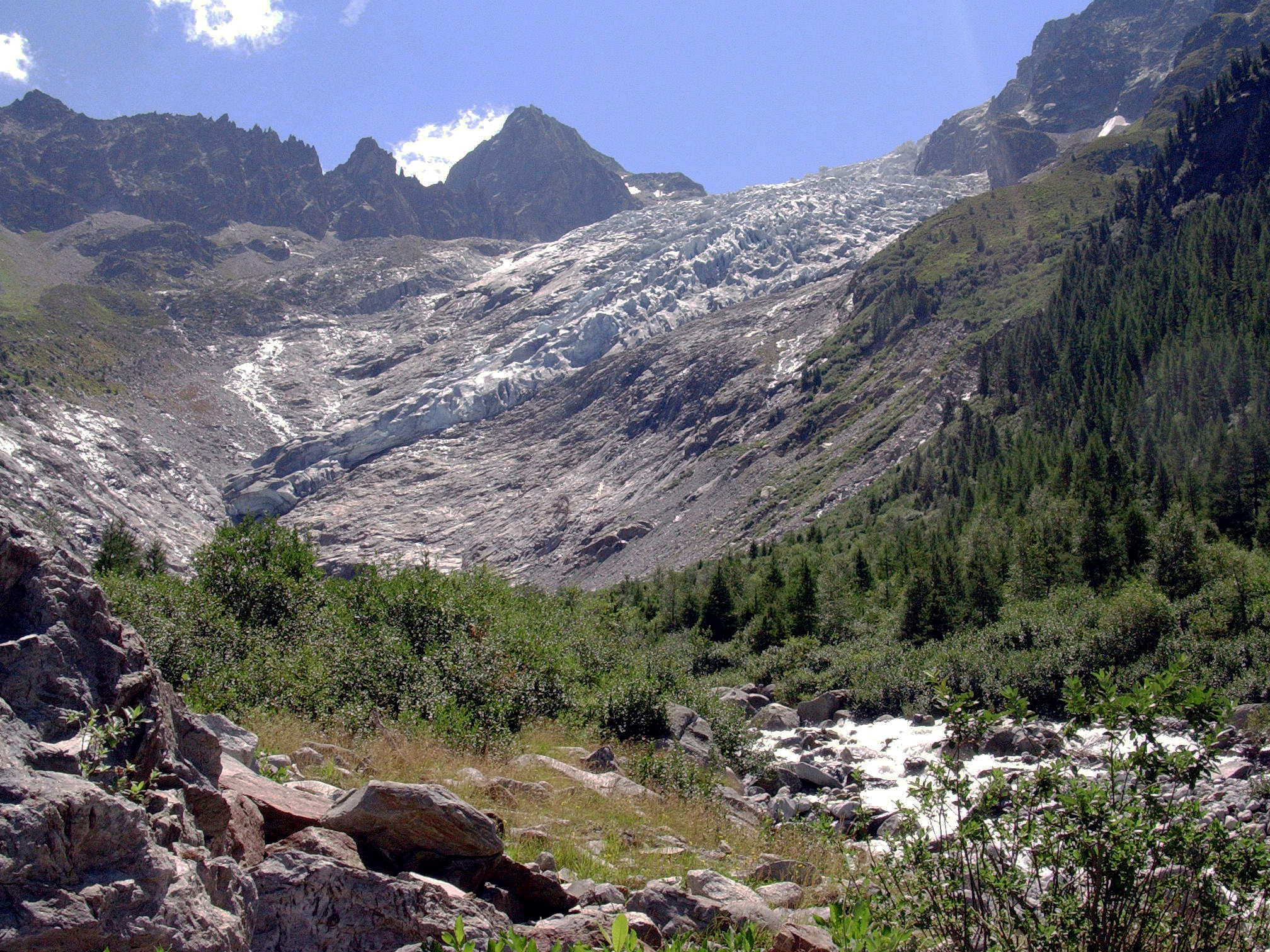 Le glacier du Trient, source de la rivière du même nom